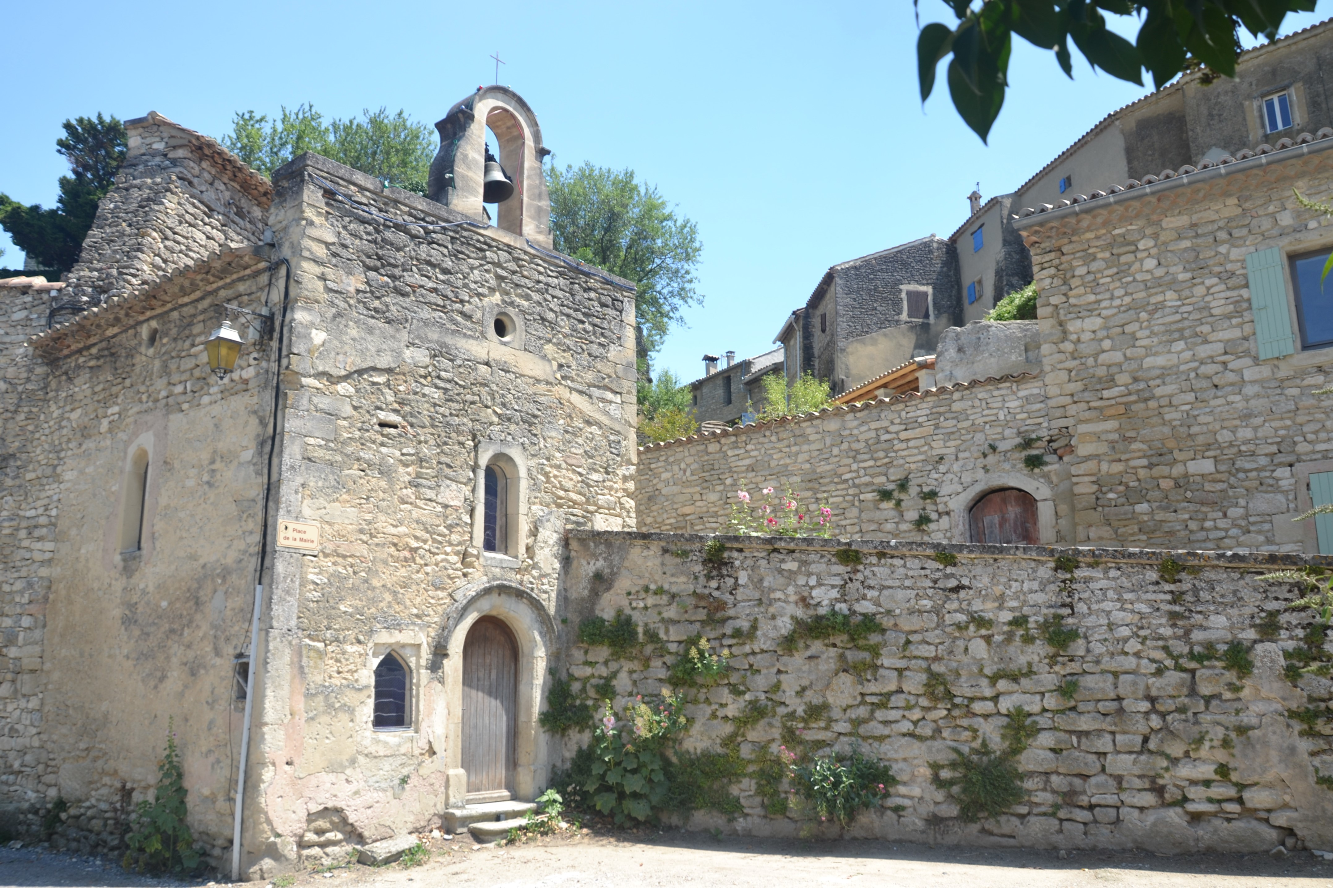 chapelle à Chantemerle-lès-Grignan